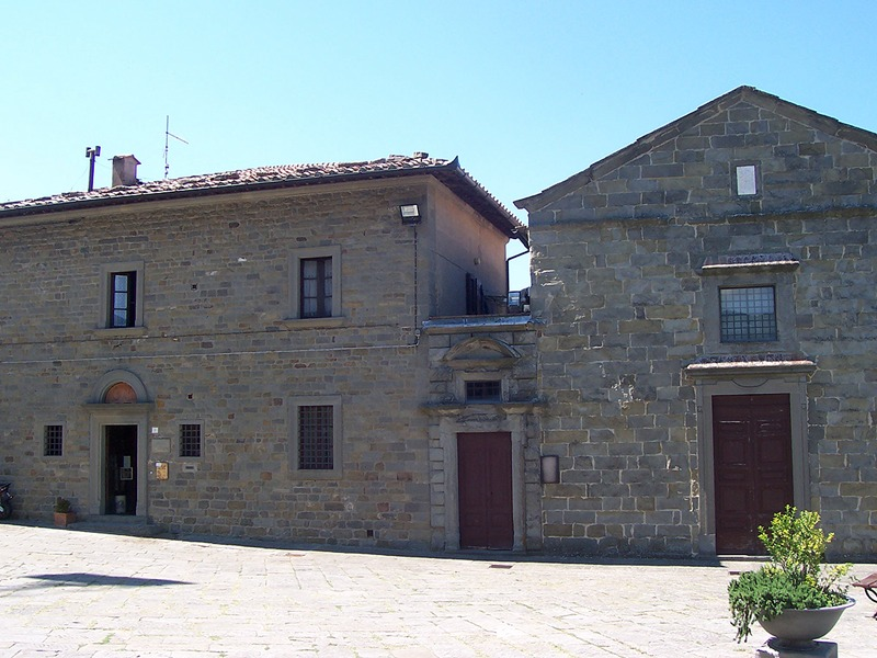 Cortona - Museo Diocesano